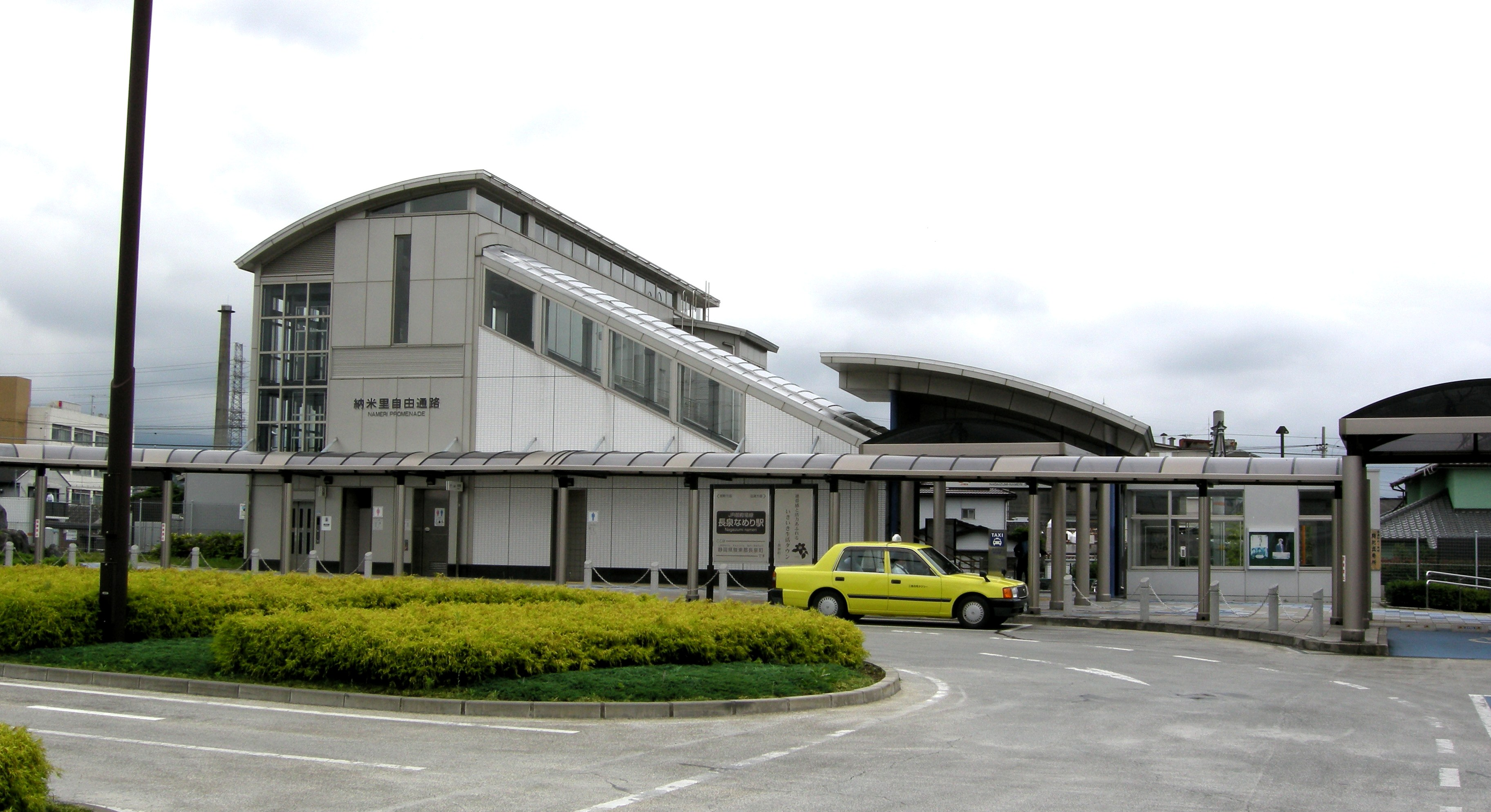 Nagaizumi-nameri station.